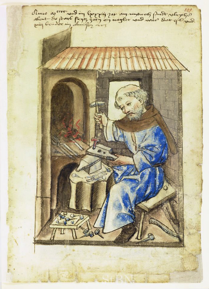 frycz (Fritz) zorn (Zorn) , nagler (Nagler; Nagelschmied) Transkription und weitere Informationen